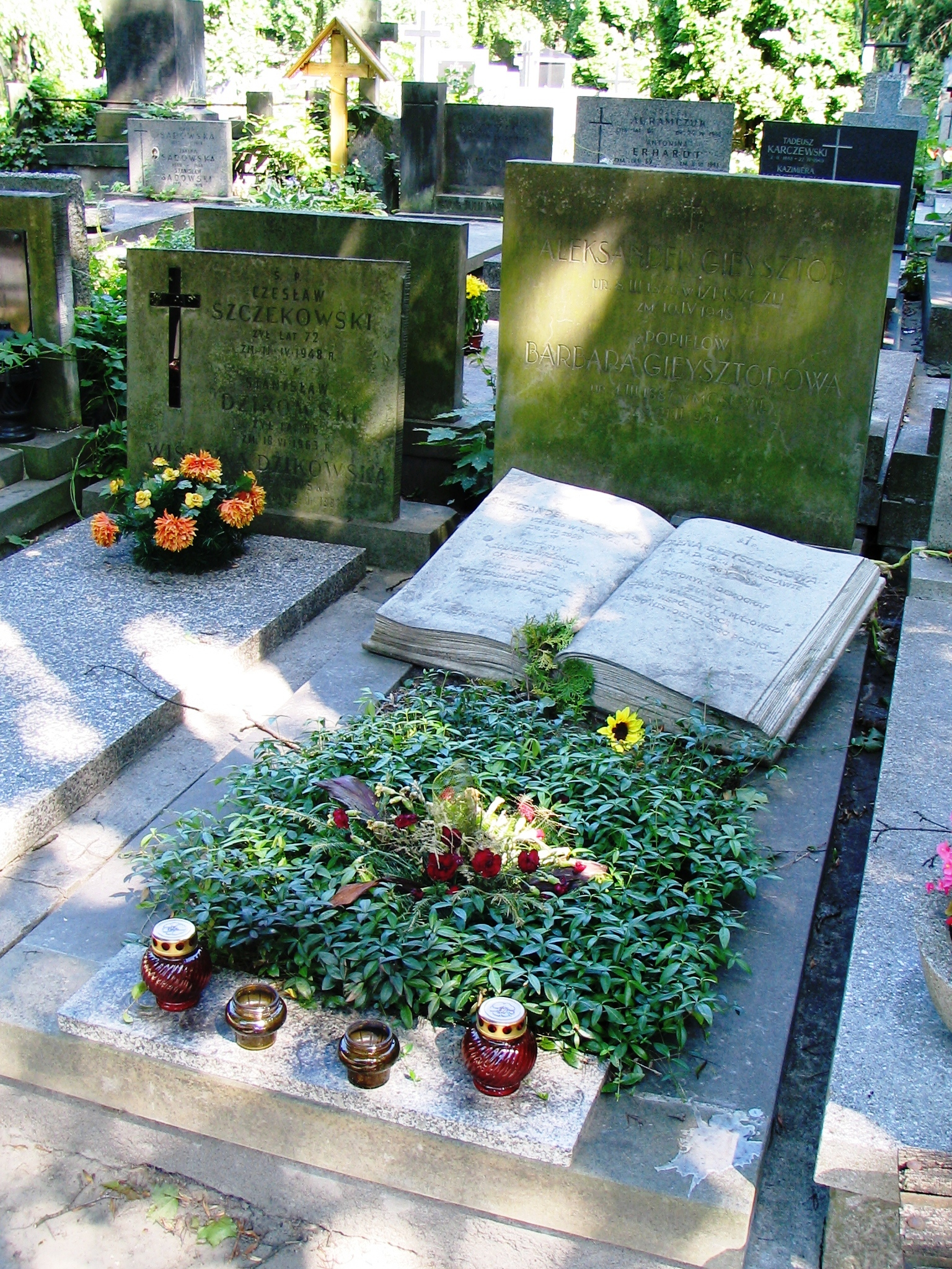 Grób Aleksandra Gieysztora, jego żony Ireny i rodziców